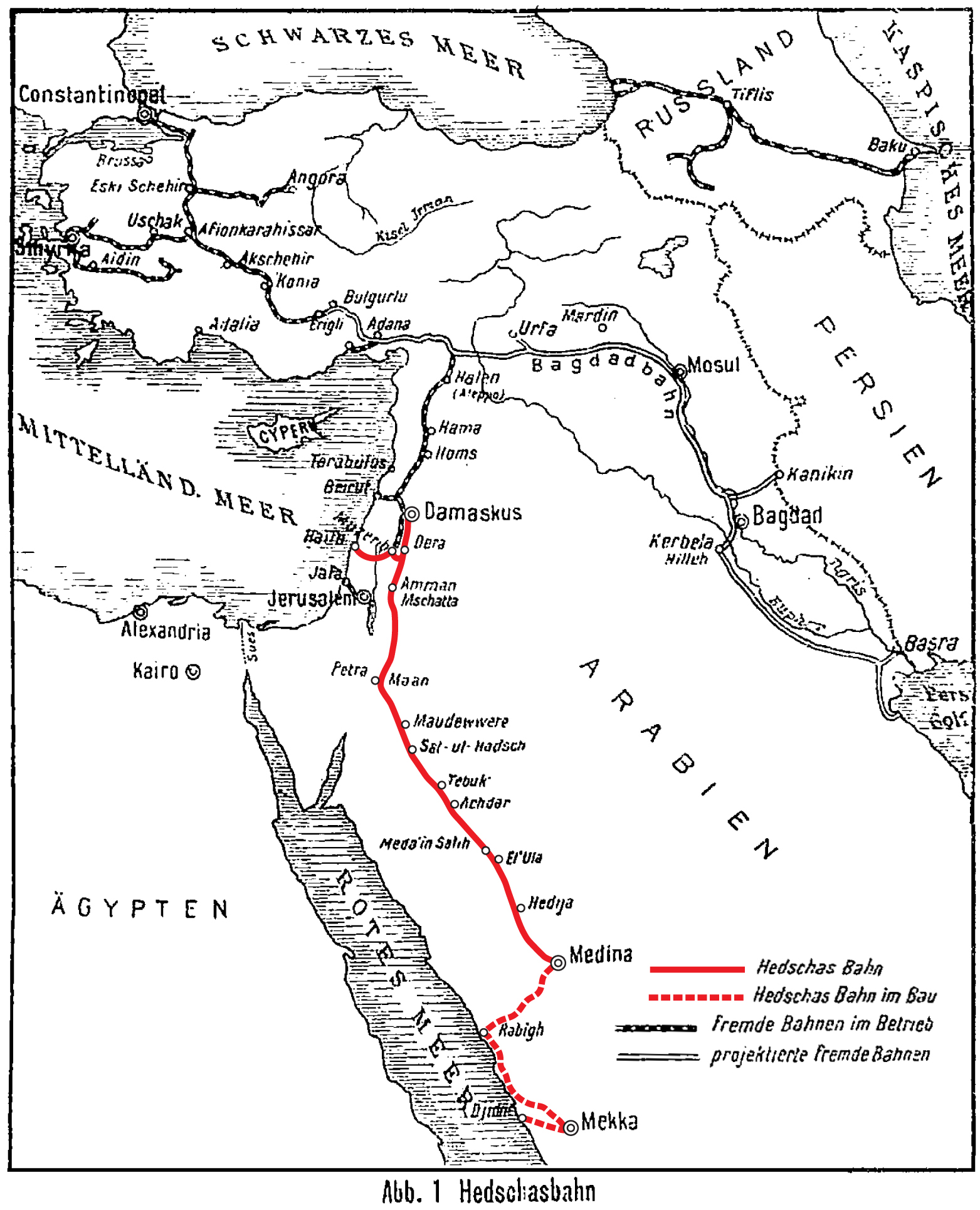 Strecke der fertiggestellten sowie der in Bau befindlichen Hedschasbahn